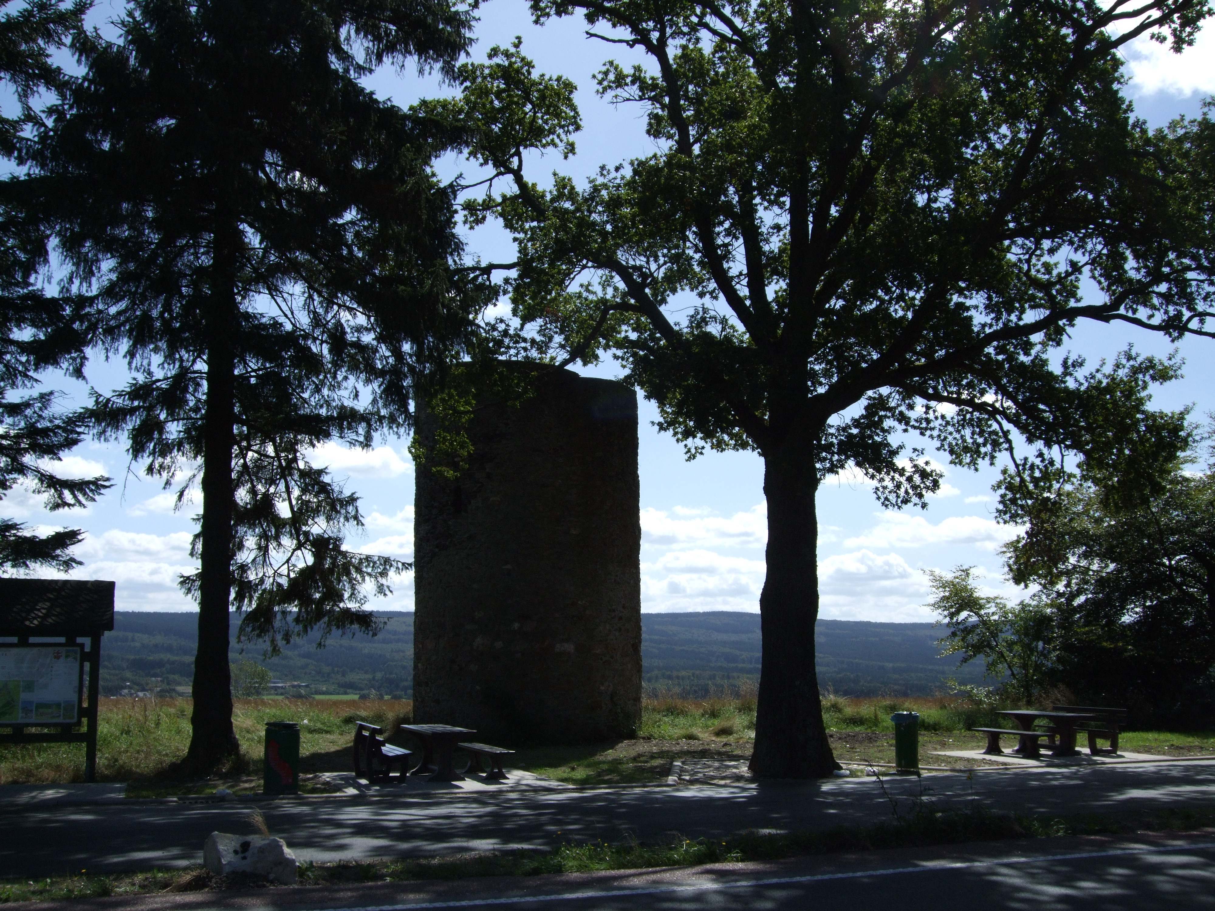 Stumpfer Turm bei Morbach